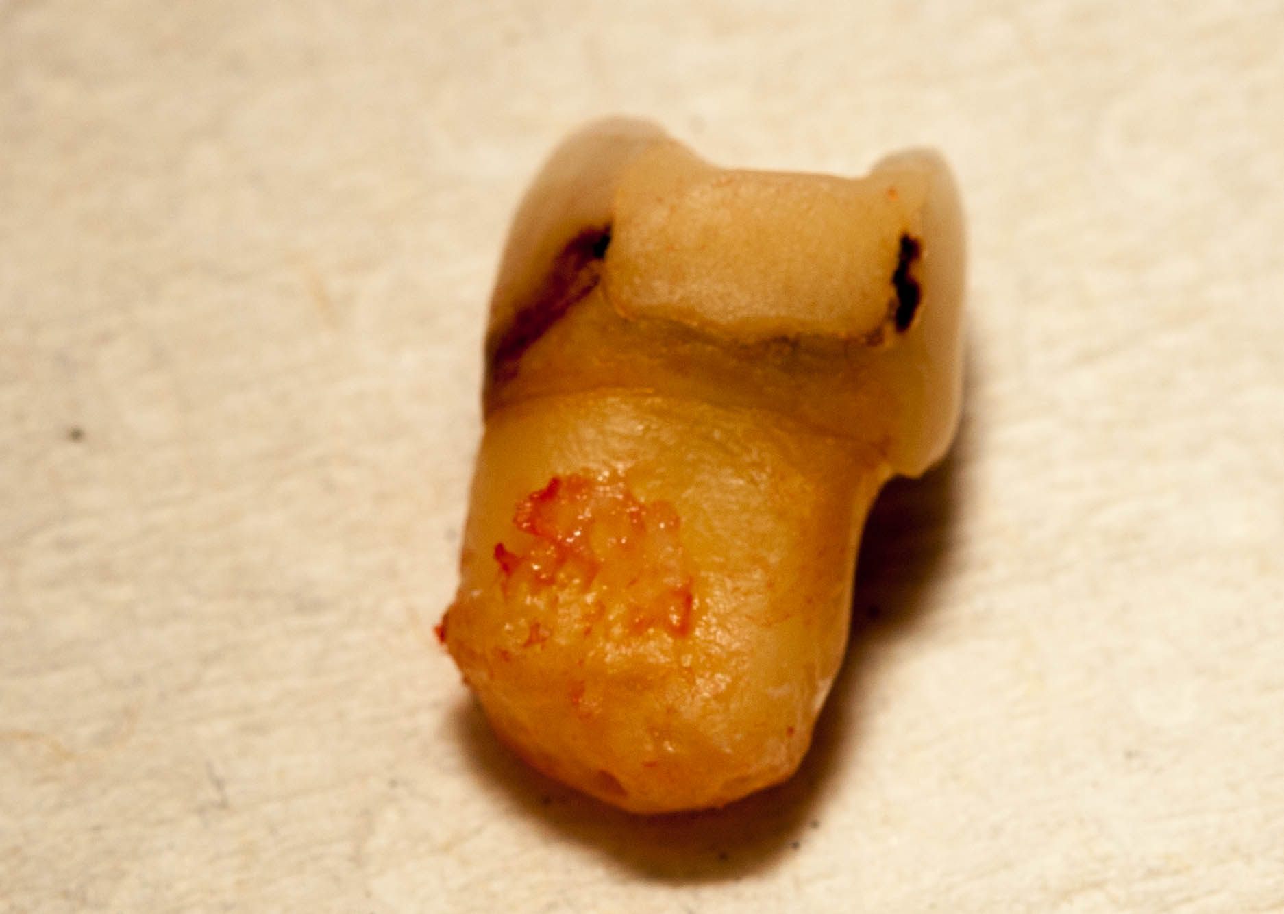 Wurzelresorption Zahn 25 und keilformiger Defekt